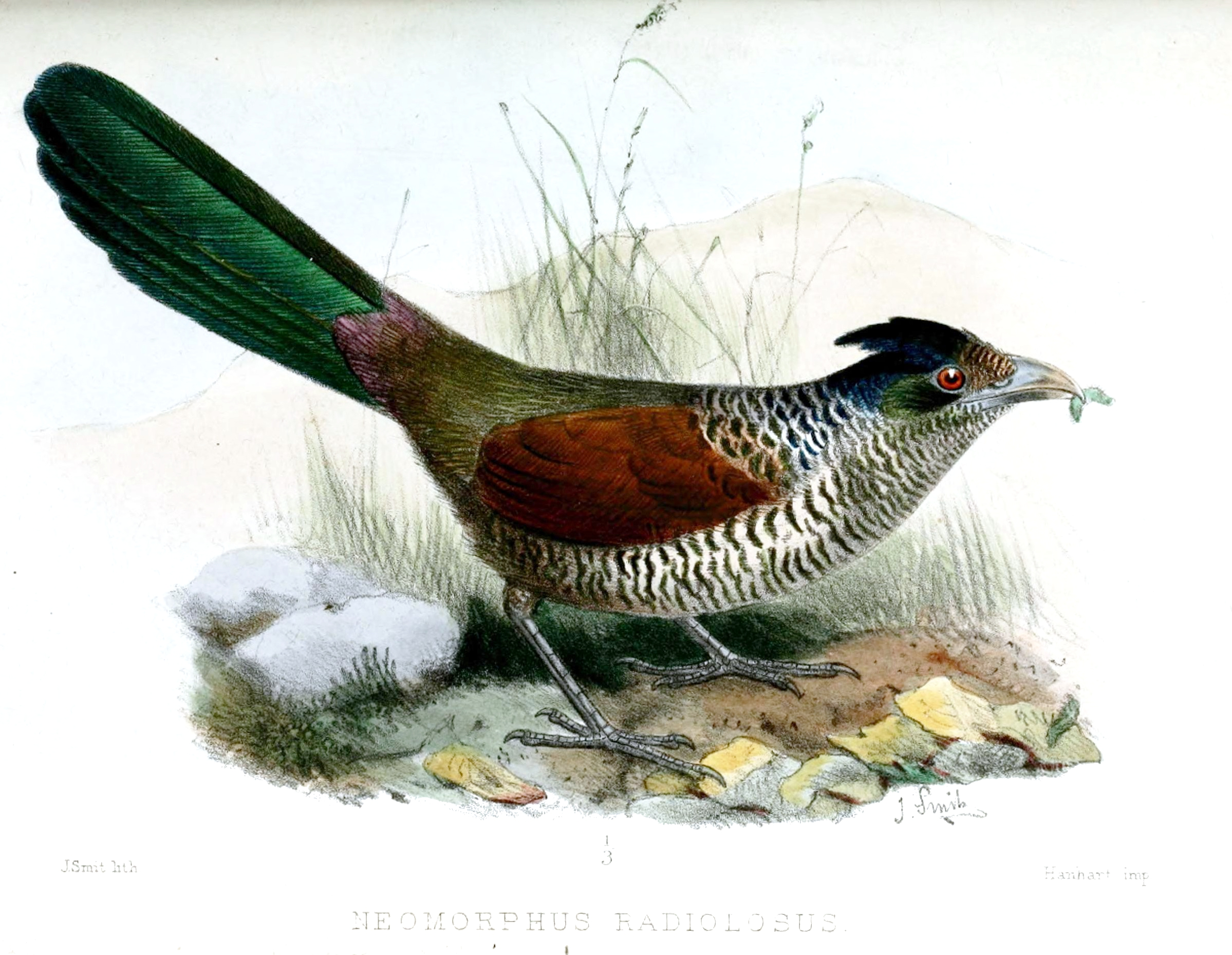 Neomorphus radiolosus